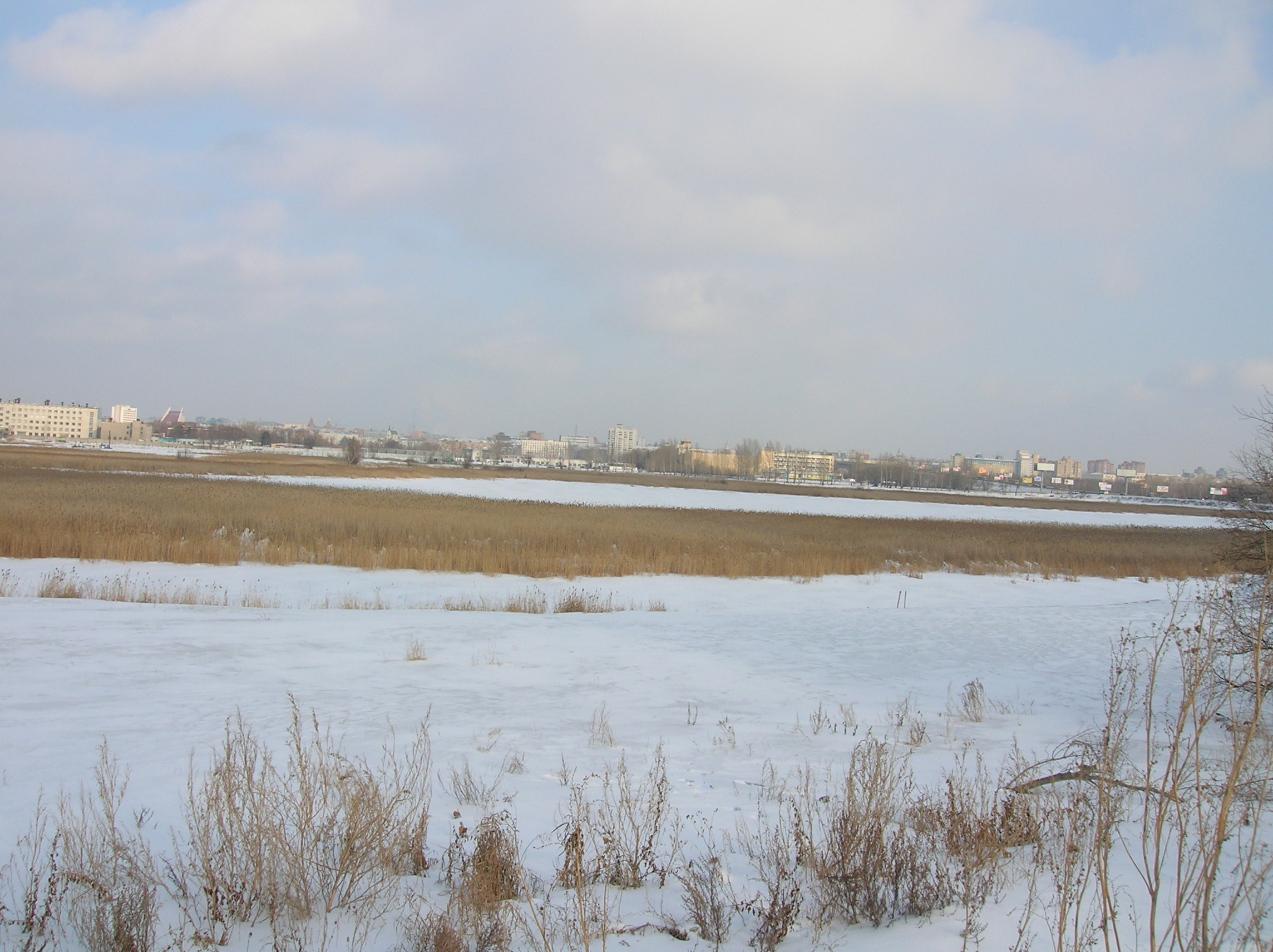 Природный парк «Птичья гавань» зимой.